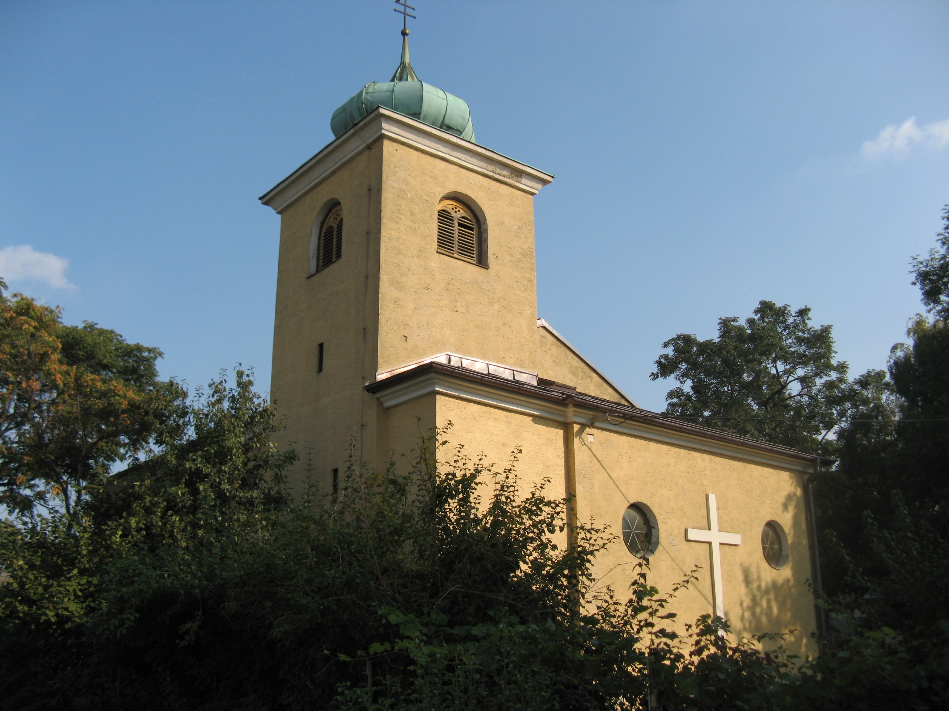 Filialkirche Hl. Franz von Assisi (1952-55) von Oskar Dechant, Rothneusiedl, Wien-Favoriten